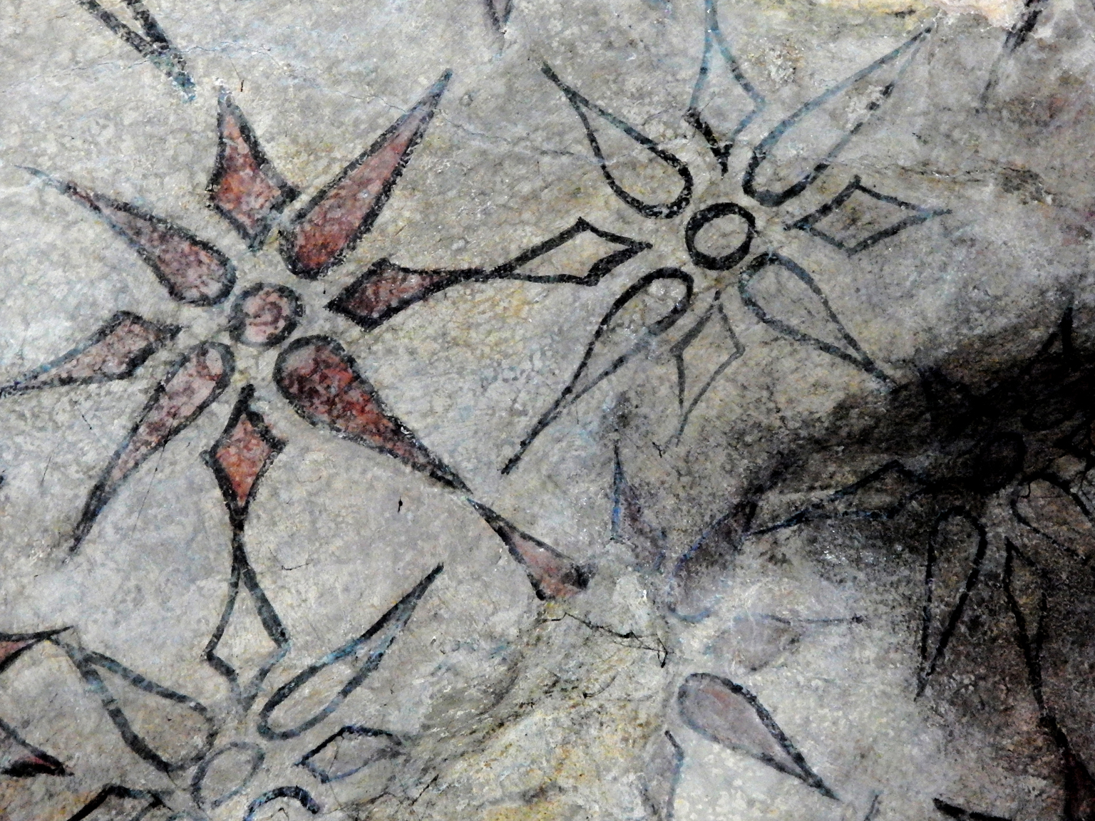 Jerozolima, Grota Pojmania Jezusa, Grota Getsemani